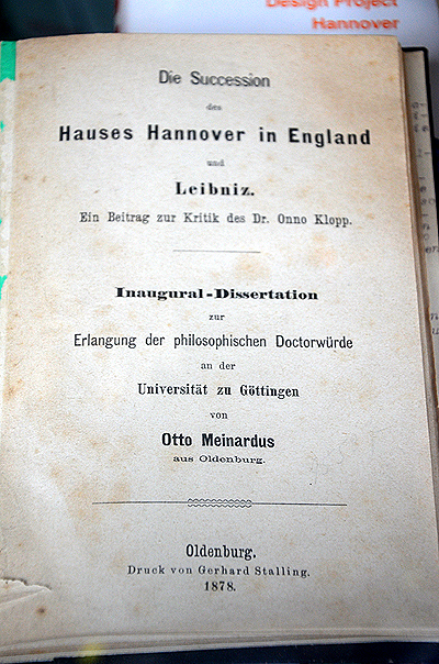 Innentitel der gebundenen „Inaugural-Dissertation zur Erlangung der philosphischen Doctorwürde an der Universität zu Göttingen von Otto Meinardus aus Oldenburg.“ Das 1878 von Gerhard Stalling in Oldenburg gedruckte Buch beleuchtet die Hintergründe zur Personalunion zwischen Großbritannien und Hannover, hier speziell „Die Succession des Hauses Hannover in England und Leibniz (und verstand sich als) ein Beitrag zur Kritik des Dr. Onno Klopp.“